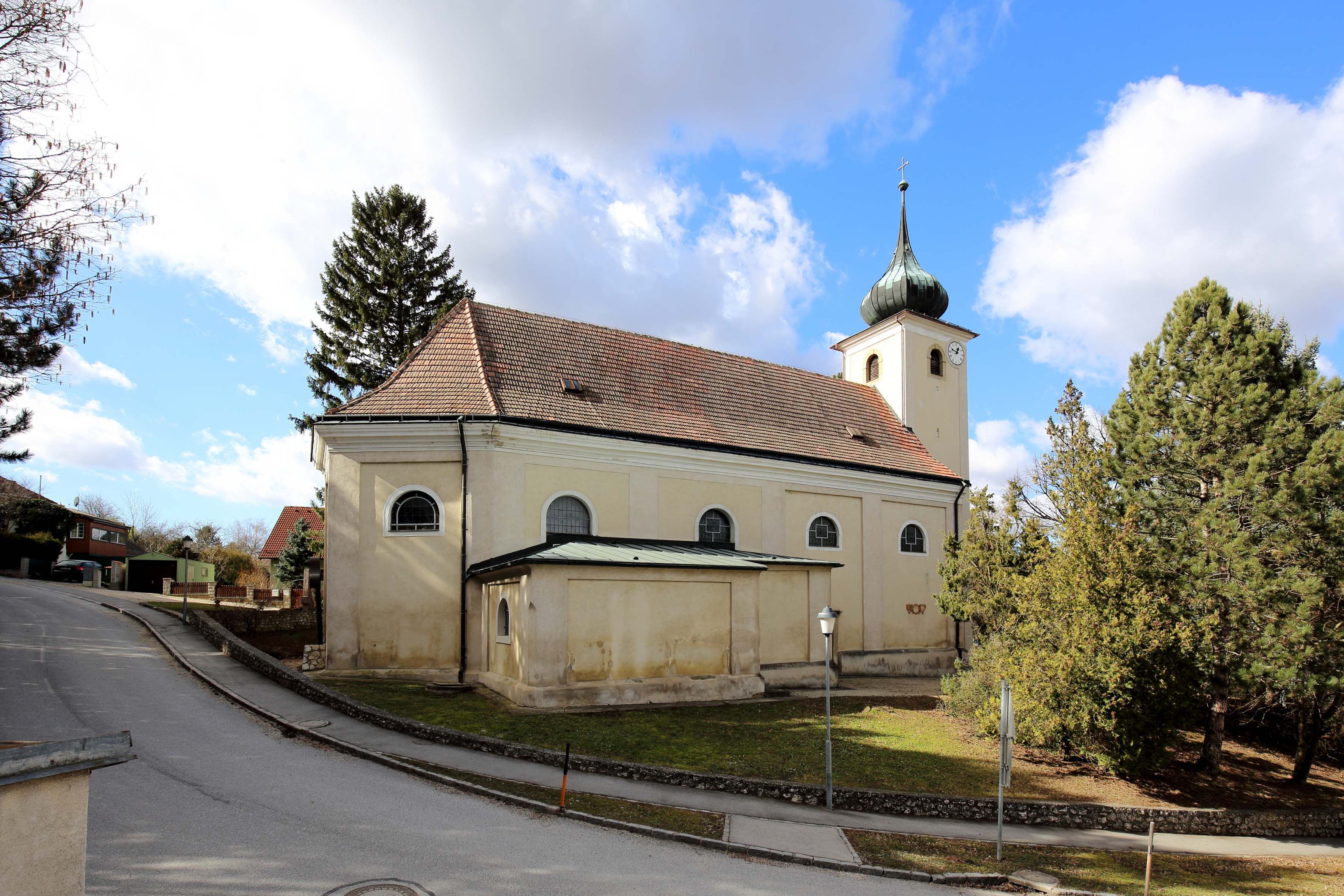 Ostansicht der katholischen Pfarrkirche hl. Peter in Schleinbach, ein Ortsteil der niederösterreichischen Marktgemeinde Ulrichskirchen-Schleinbach. Ein barocker Sakralbau aus dem Jahr 1687 mit vermutlich mittelalterlichem Kern. Der gotische Nordturm wurde 1436 errichtet.